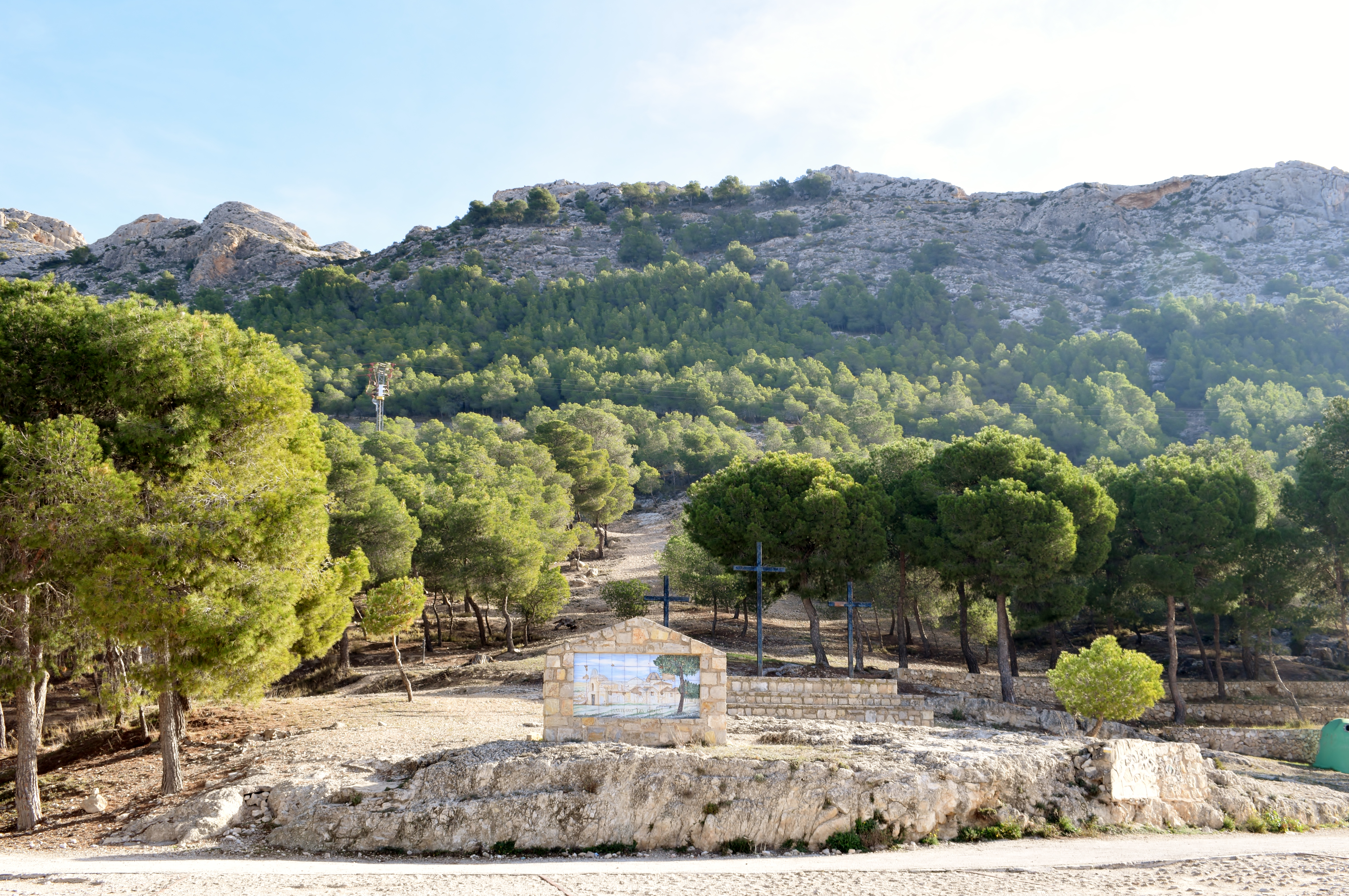 Villena.